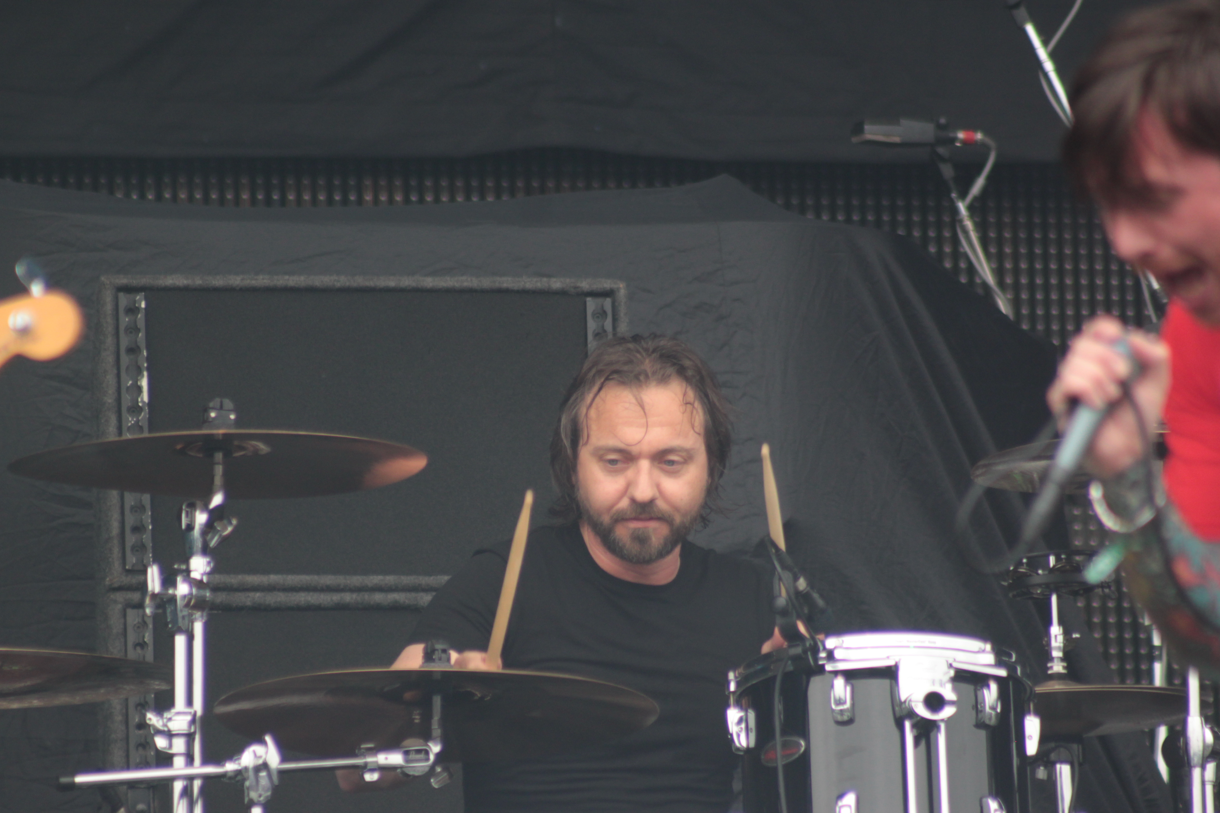 Kjetil Greve, Audrey Horne, Helfest 2013, Fr-44-Clisson.